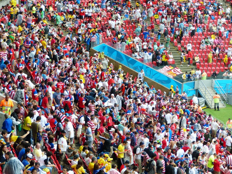 Copa do Mundo 2014 - Alemanha X Estados Unidos no Recife.